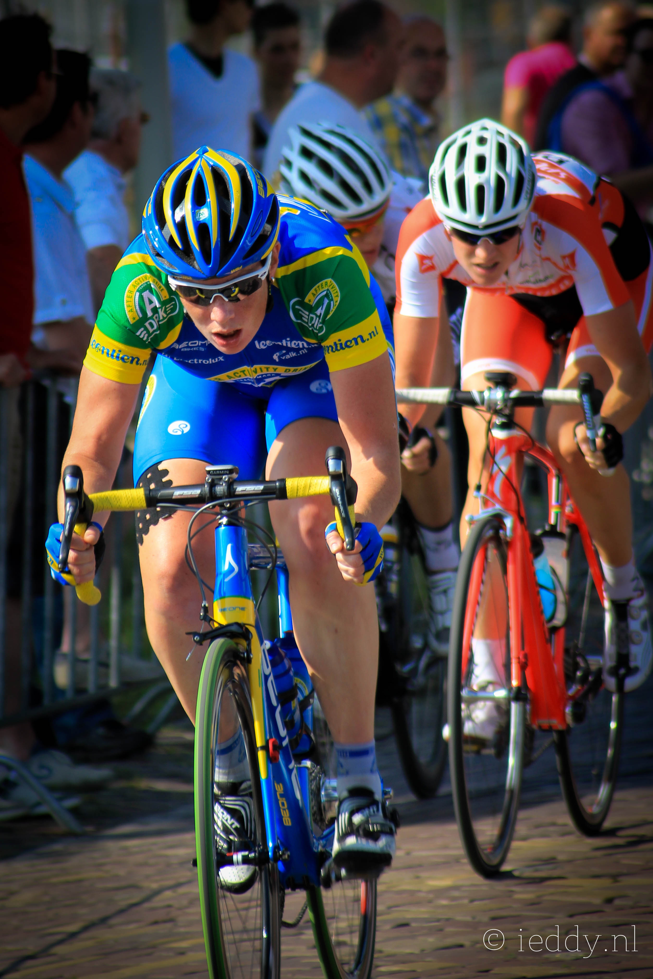 Kirsten Wild Draai van de Kaai 2011